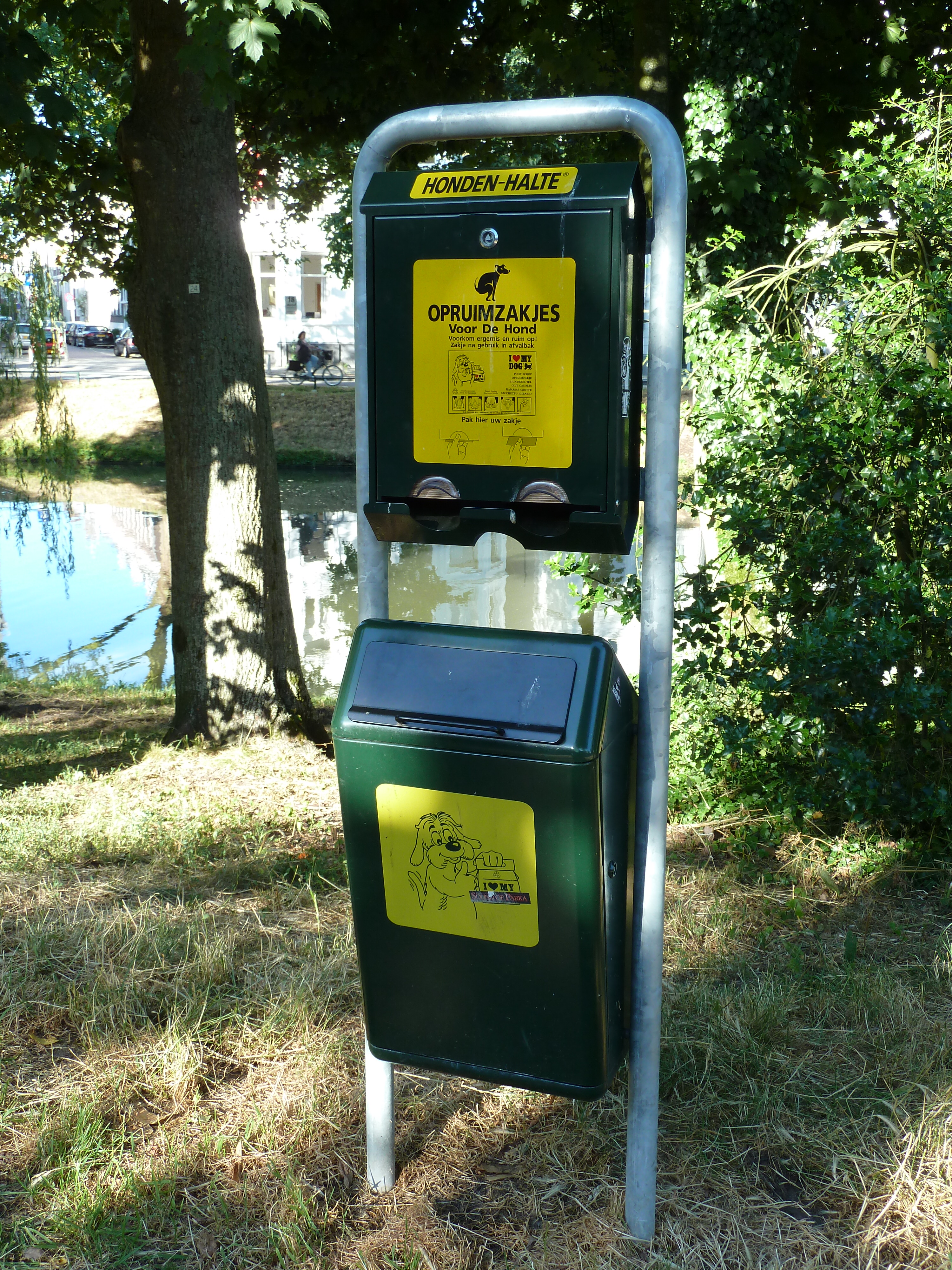 Hondenhalte in Utrecht: hondenpoepcontainer gecombineerd met hondenpoepzakjesuitgiftepunt